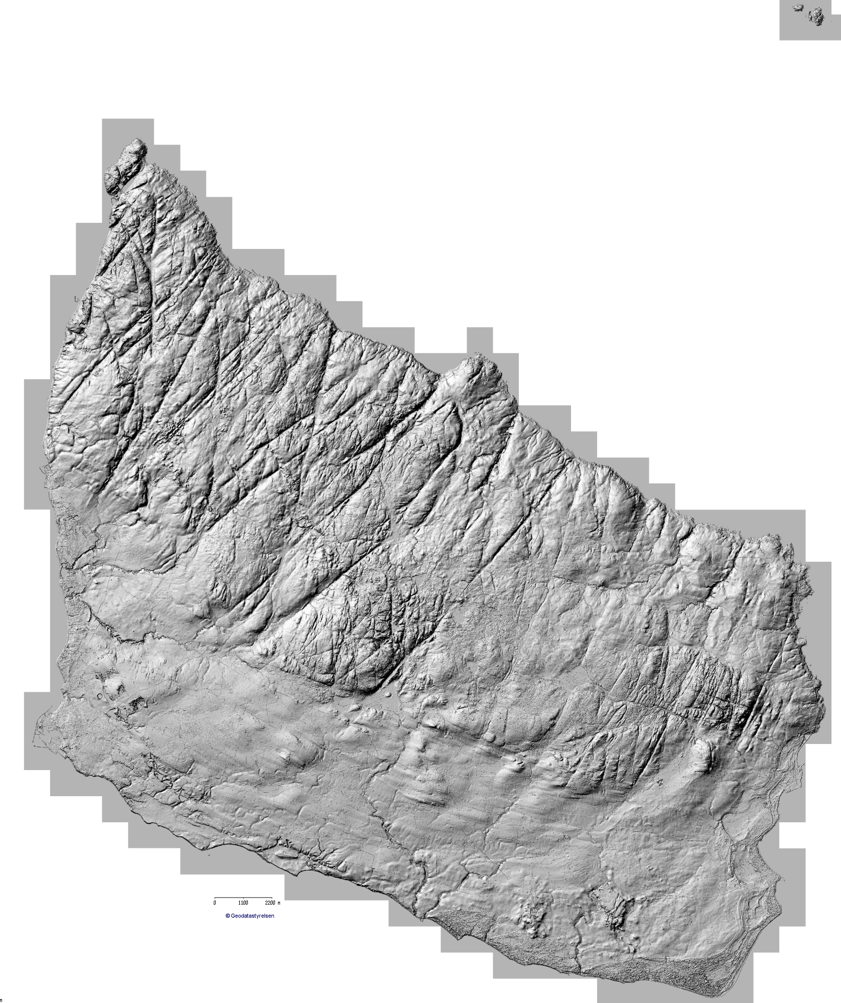 Skyggekort over Bornholm og Christiansø, hentet fra Geodatastyrelsens site (